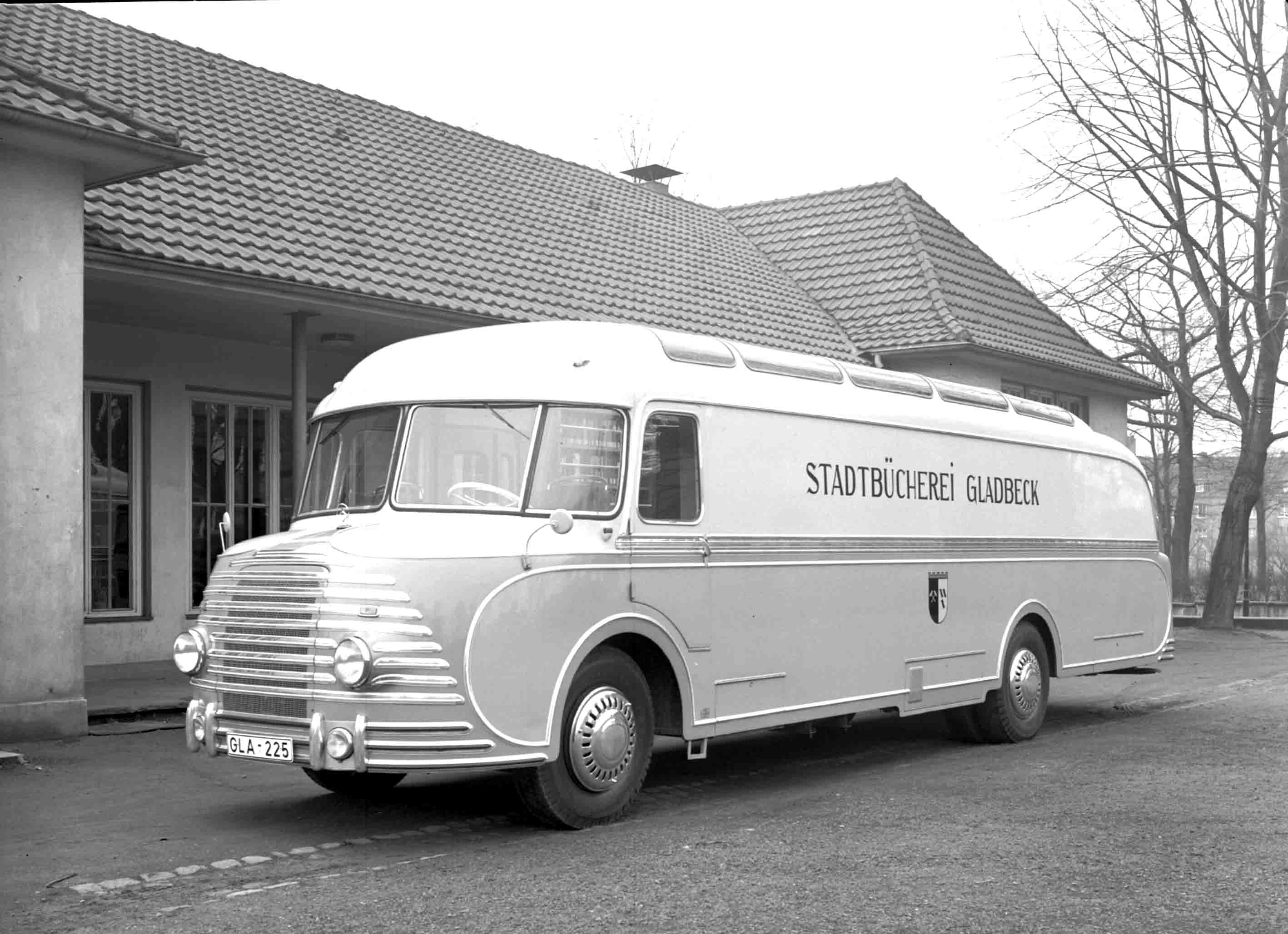 Der erste Bücherbus der Stadtbücherei Gladbeck 1957